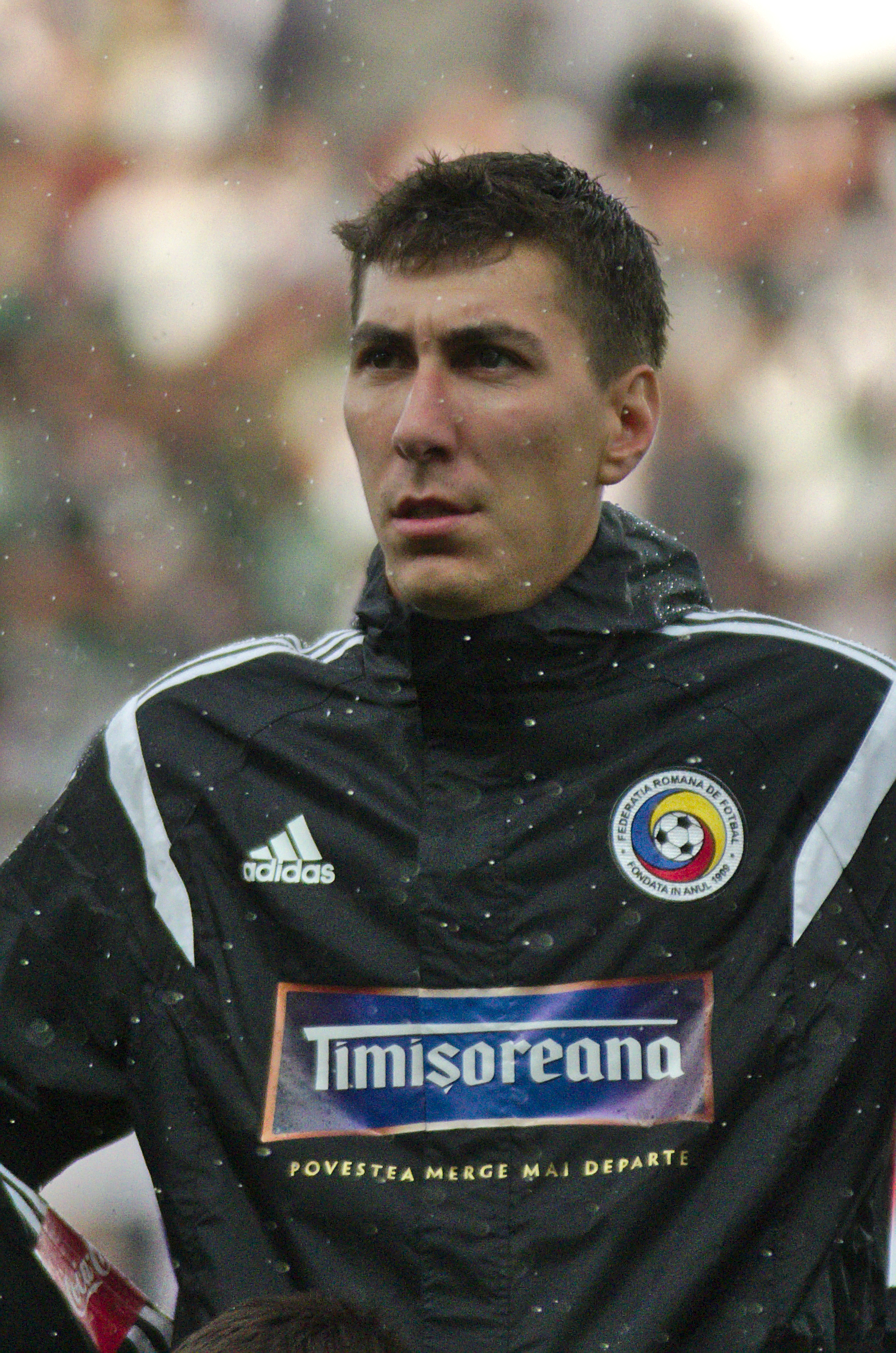 Algérie-Roumanie - 20140604 - Costel Pantilimon